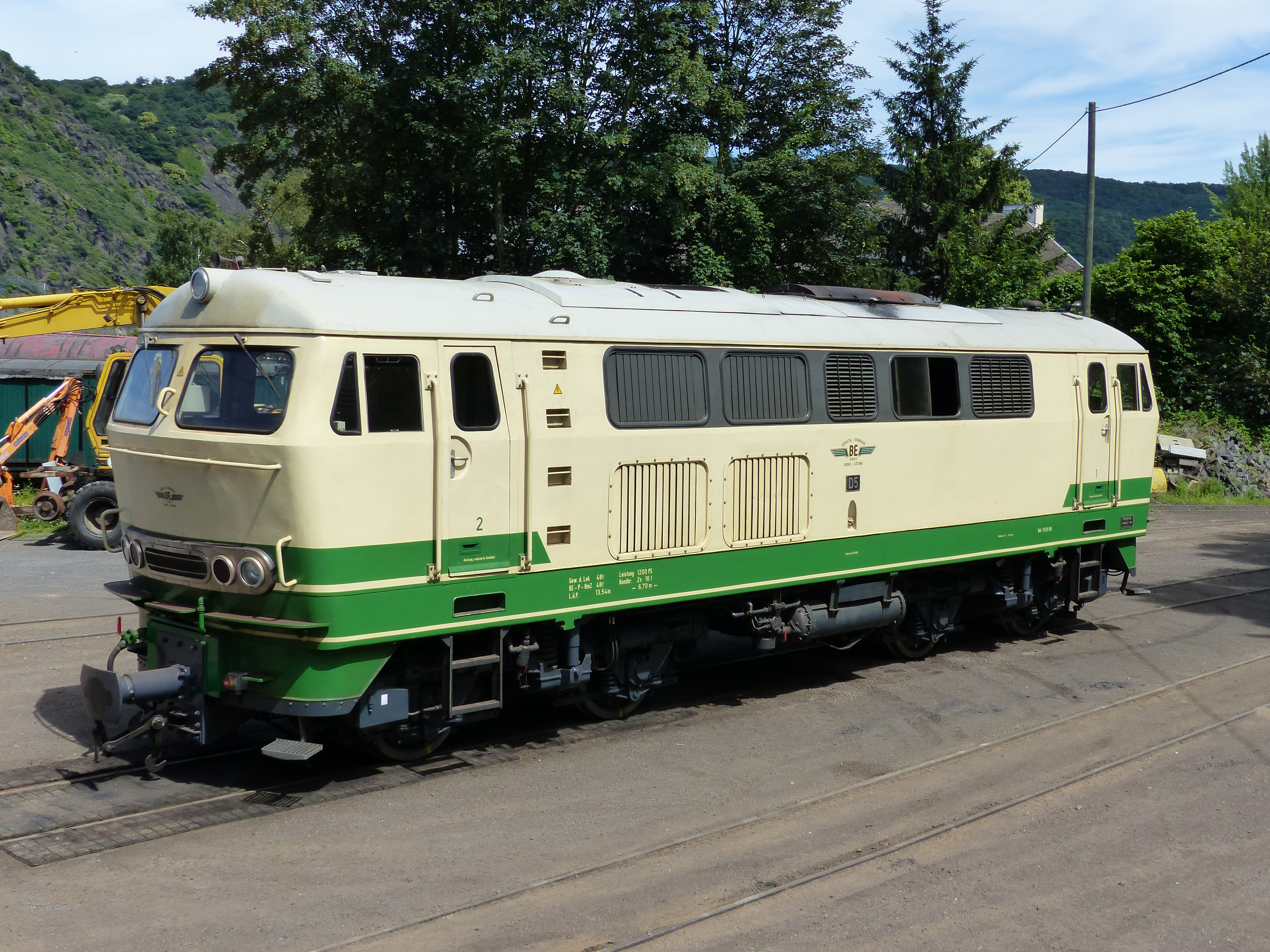 Diesellok D5 der Brohltalbahn vor dem Lokschuppen